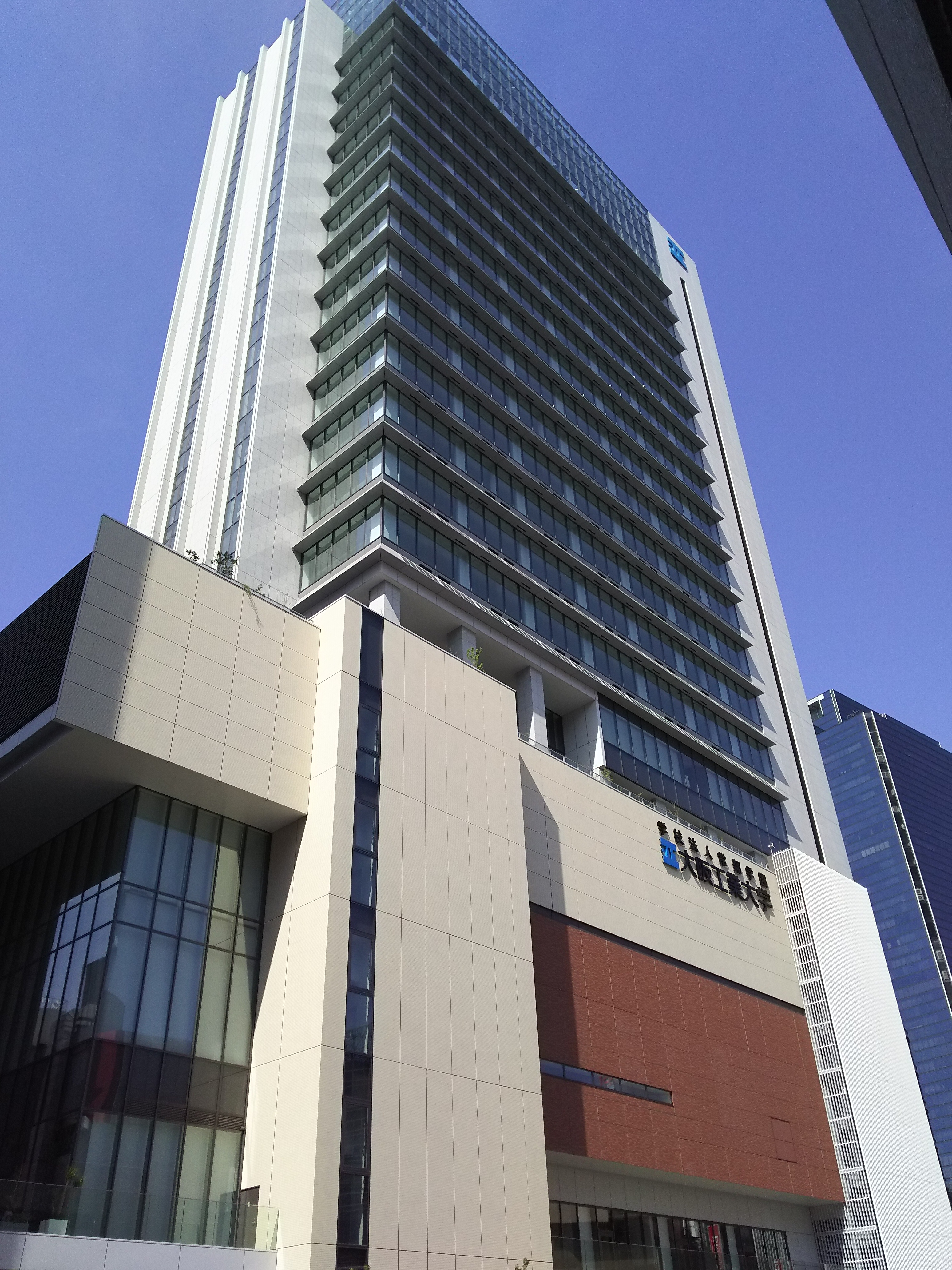 大阪工業大学梅田キャンパス（OIT梅田タワー）